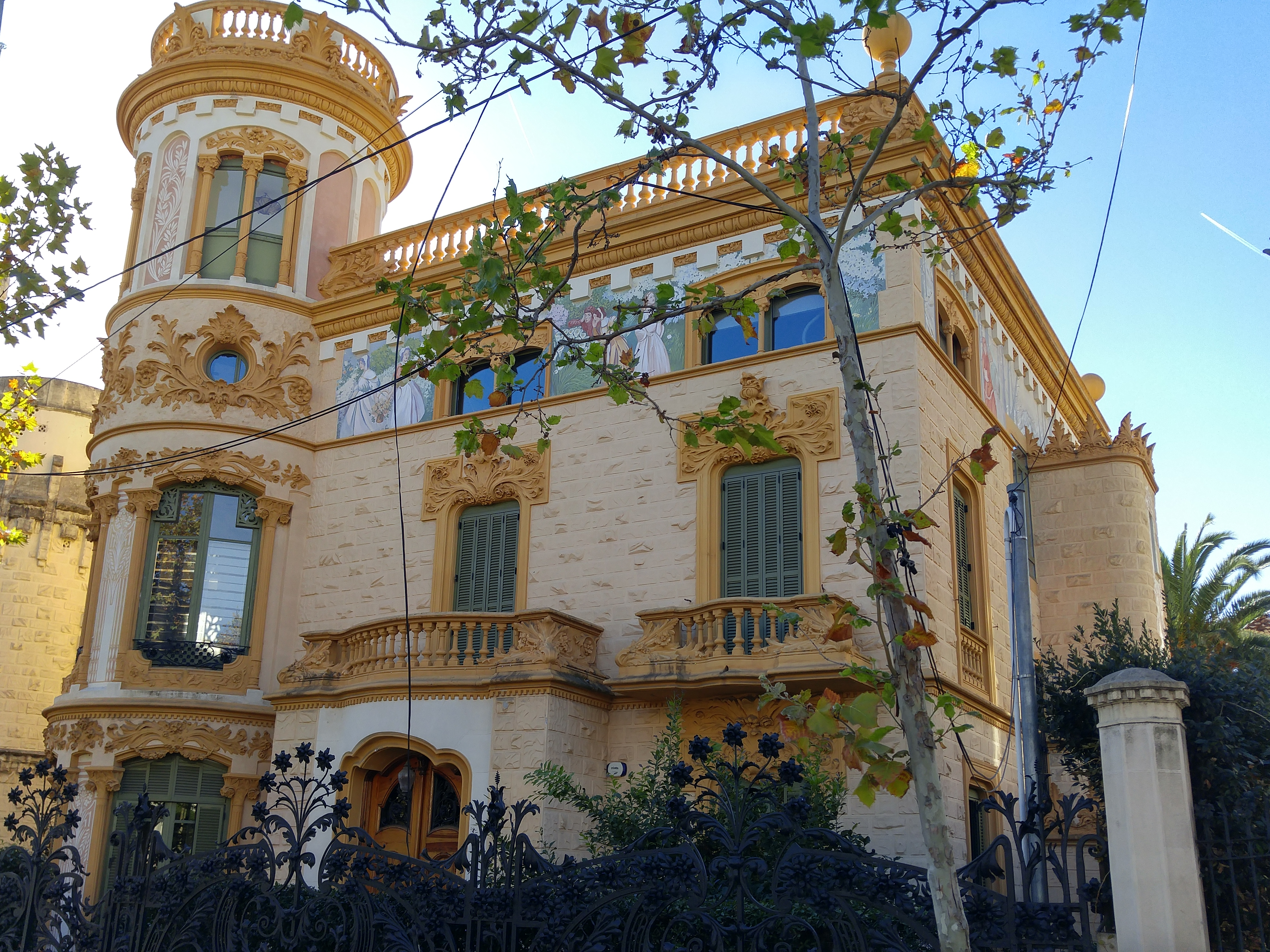 Casa Bernat i Creus a la av. del Tibidabo 27, de l'arquitecte Josep Pérez Terraza